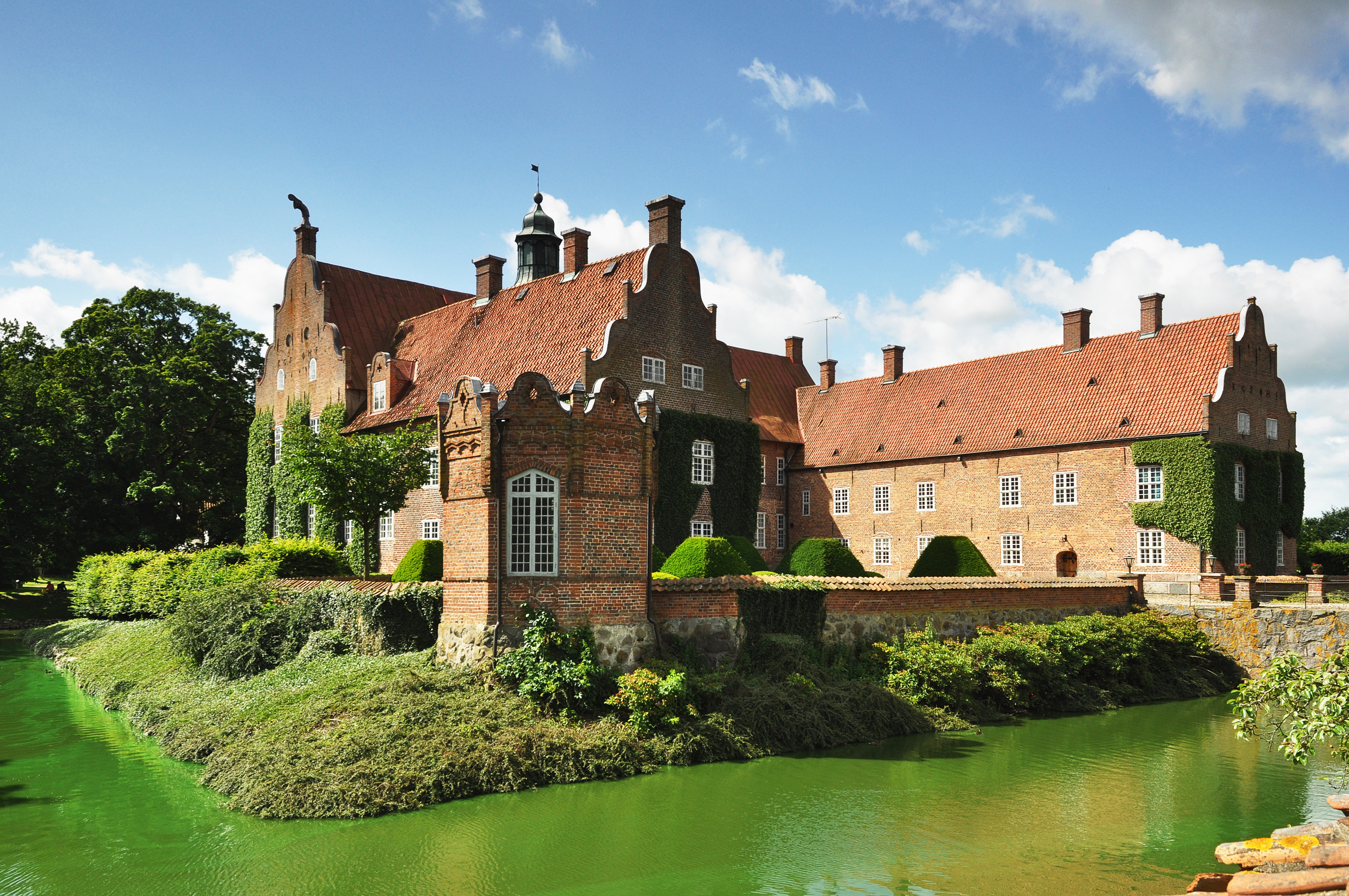 En av Skånes mest praktfulla renässansbyggnader i Christian IV-stil. Godset är ett fideikomiss i släkten Trolle-Wachtmeisters ägo. Godset är känt för sagan om Ljungby horn och pipa.